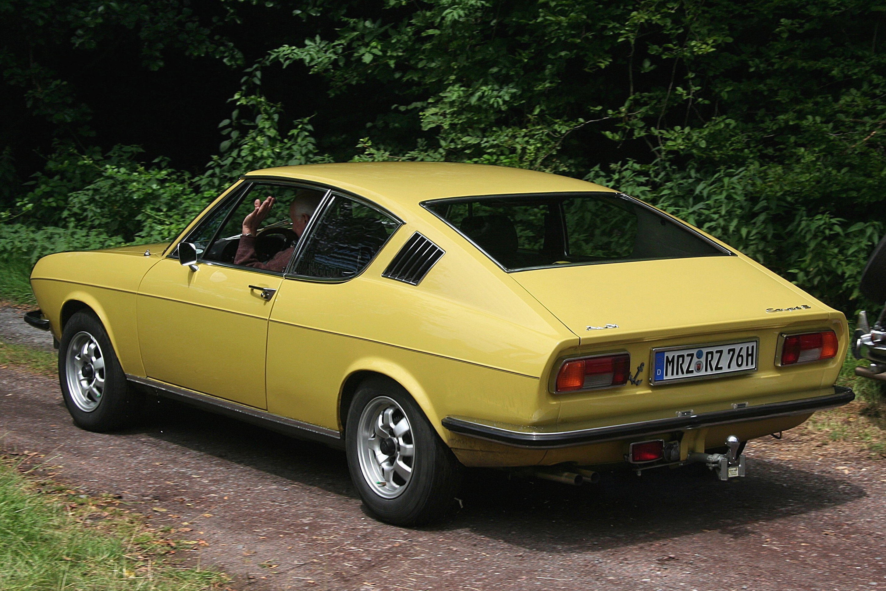 Audi 100 C1 (Kennzeichen aus Datenschutzgründen verändert)